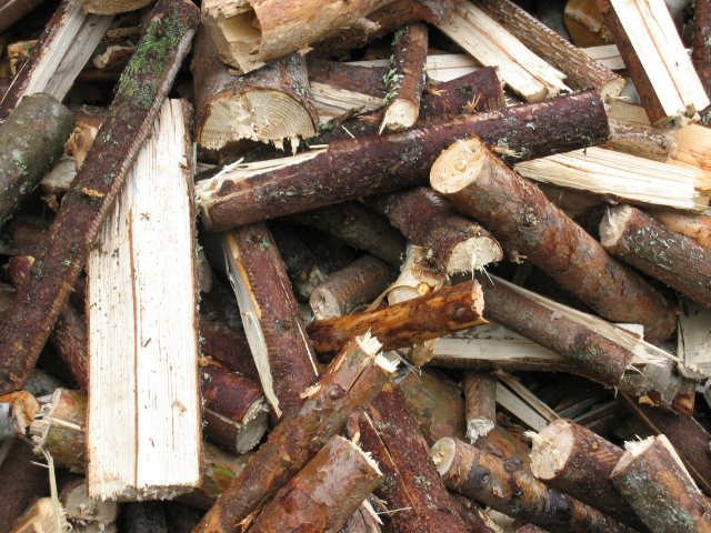 Klapeja